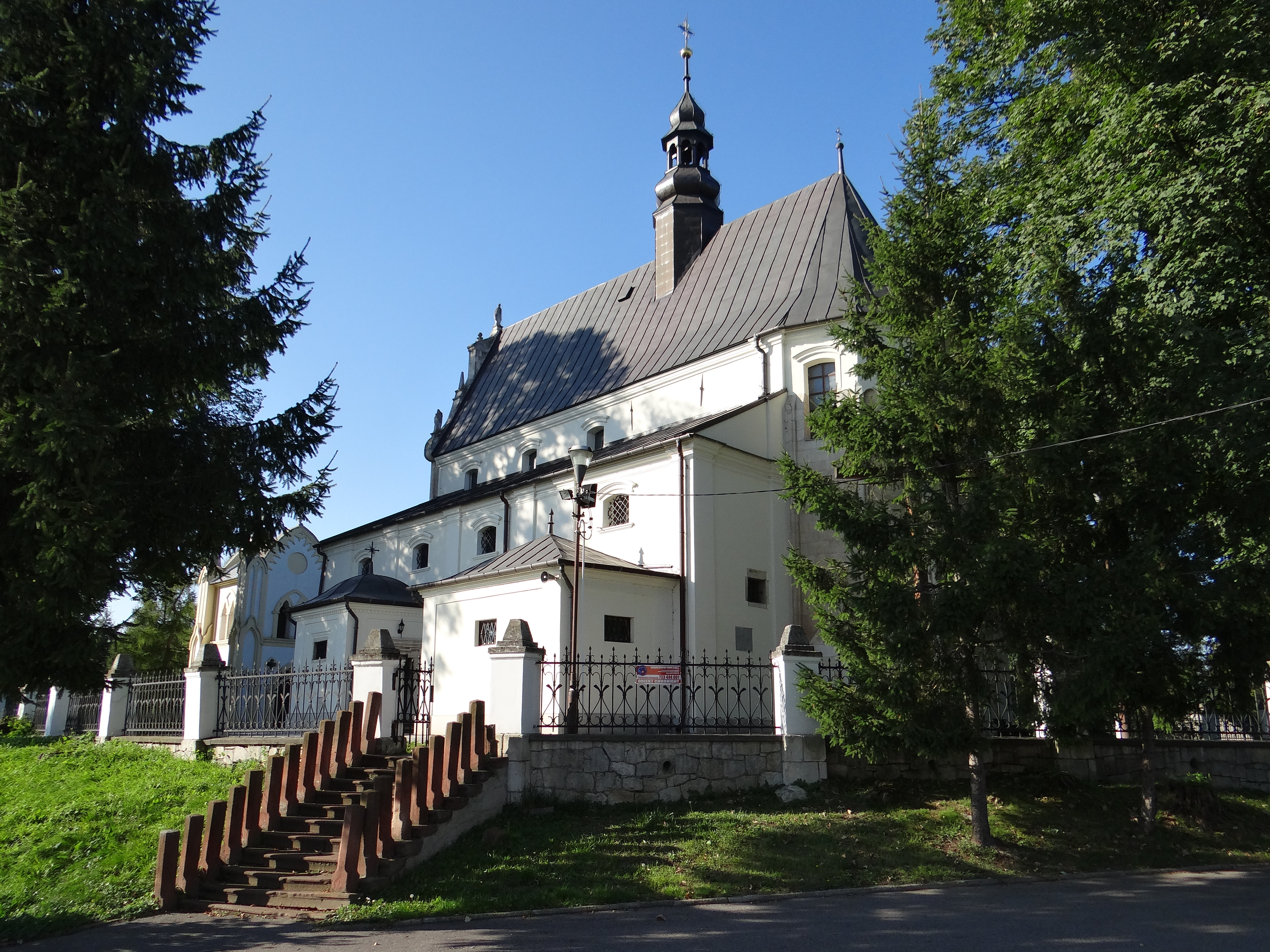 Kościelec - rzymskokatolicki kościół parafialny p.w. św. Wojciecha, 1230, 1628-1634, 1865, XX